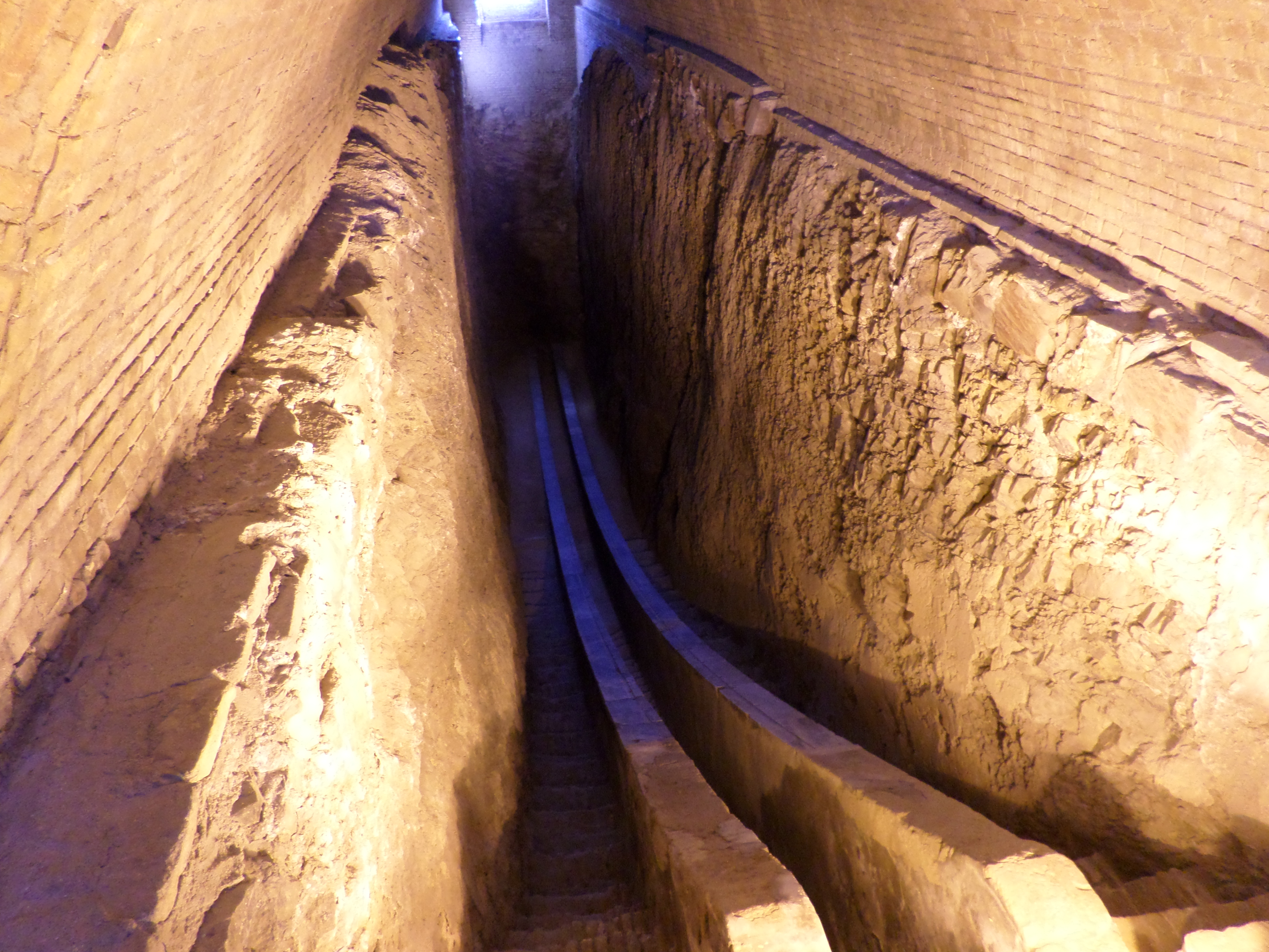 Observatie Ulugbek sextant Обсерватория Улугбека секстант